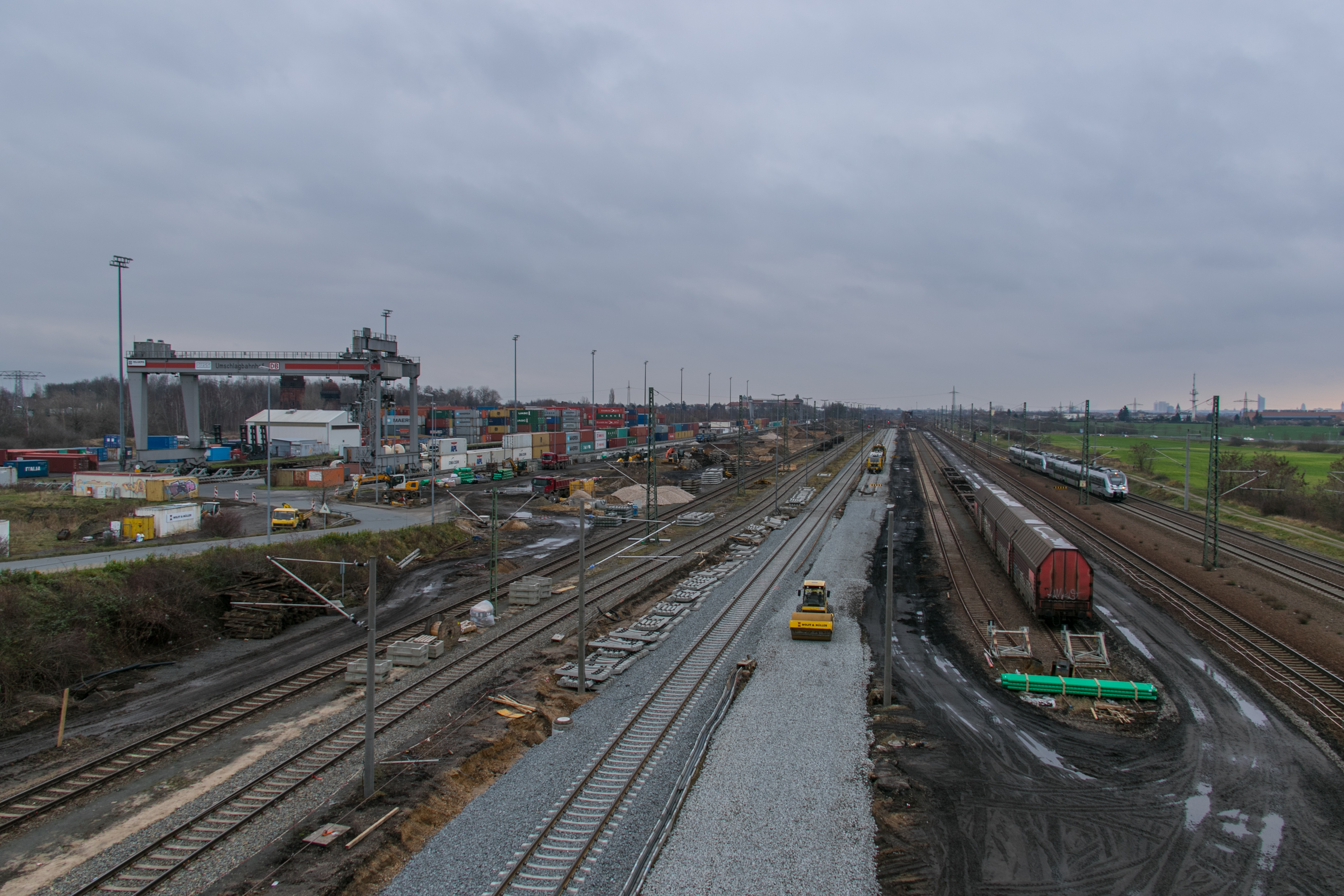 Blick von der B6 Brücke auf die Bauarbeiten am Umschlagbahnhof 2. Modul.